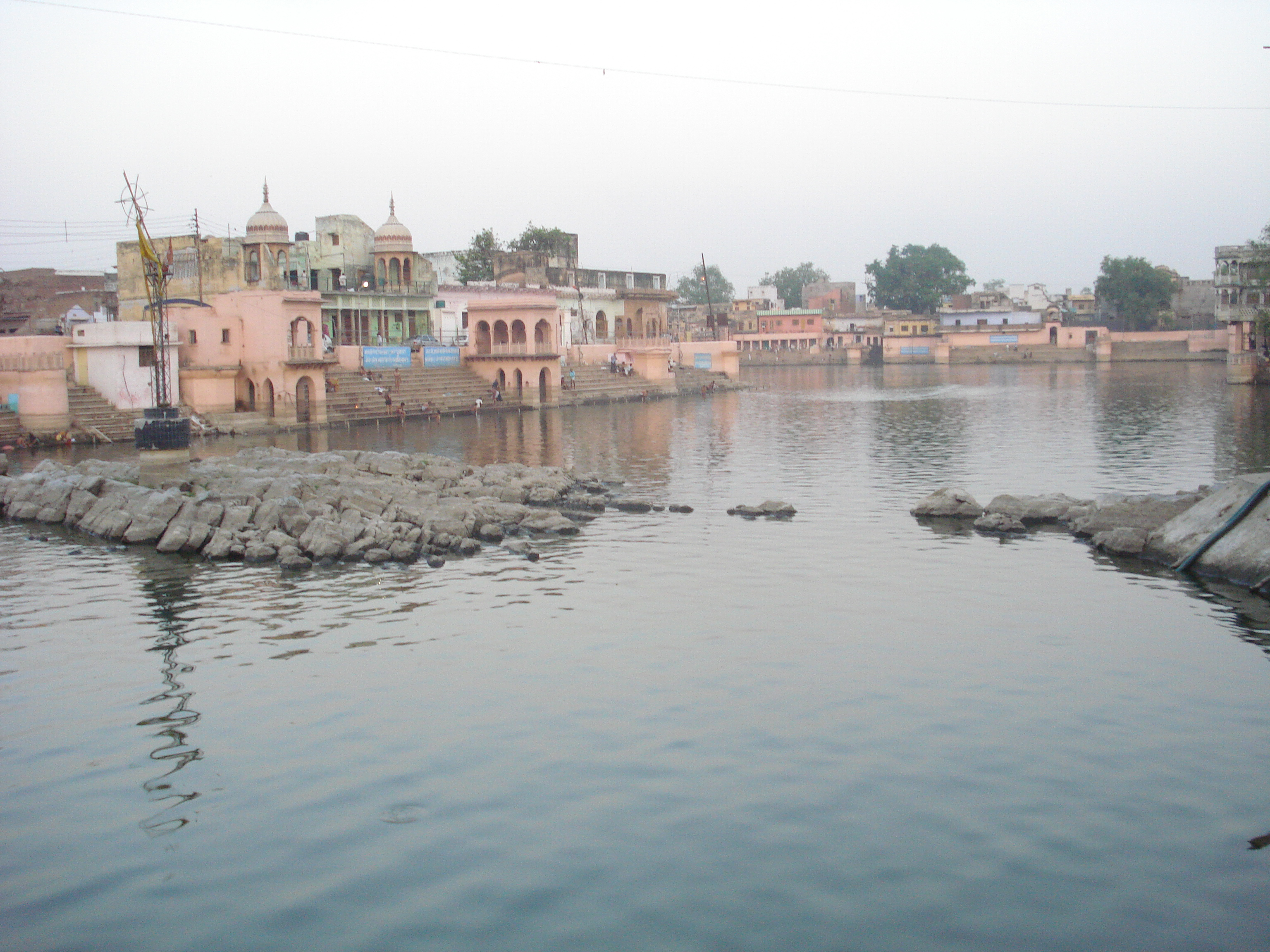 Mansi Ganga near shri Girraj Mandir ,Mathura